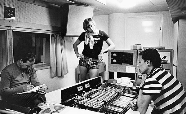 Jaakko Salo, Danny ja äänittäjä Jouko Ahera levytysstudiossa heinäkuussa 1968.